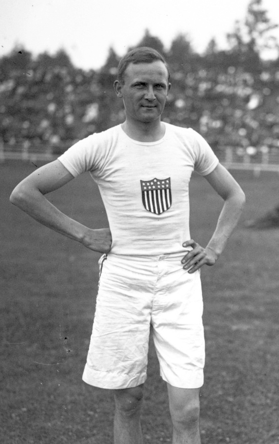 23-7-12, Reims, Harry Grumpelt, américain, saut en hauteur avec élan [portrait] : [photographie de presse] / [Agence Rol]